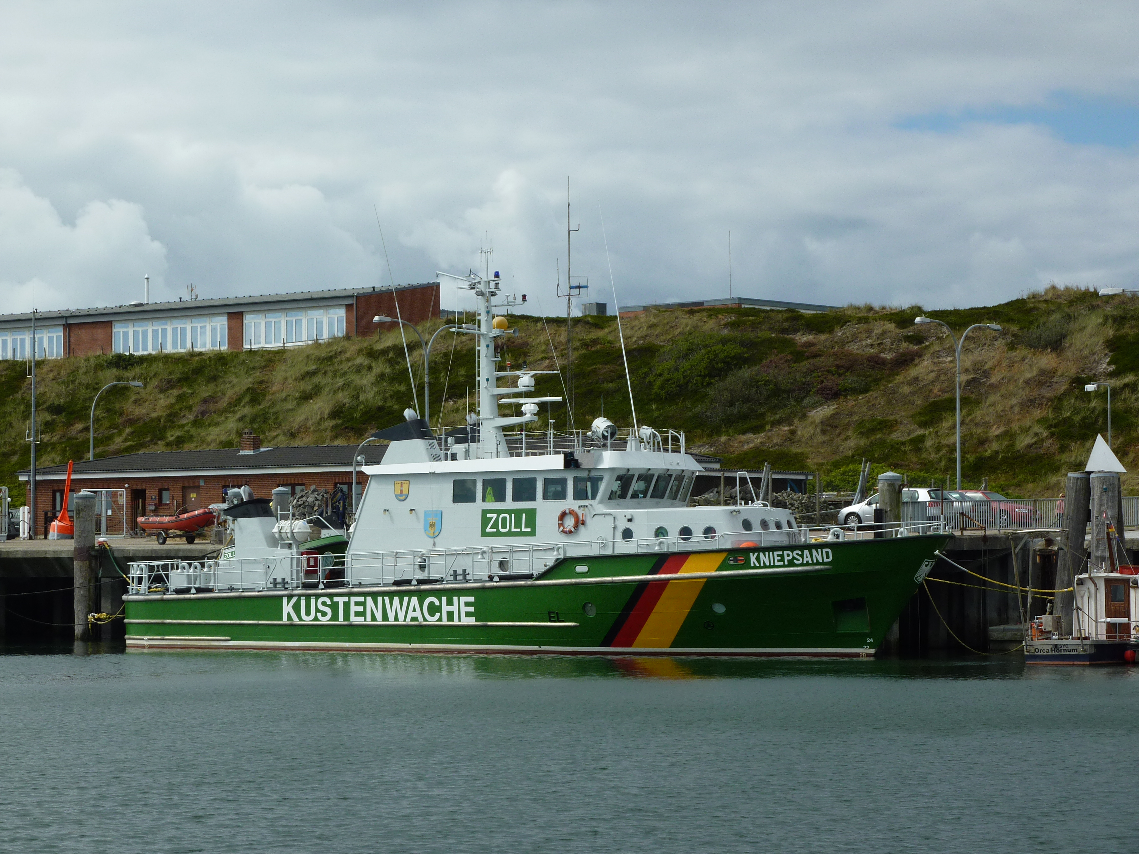 Schiff Kniepsand der Küstenwache im Hafen Hörnum auf Sylt.